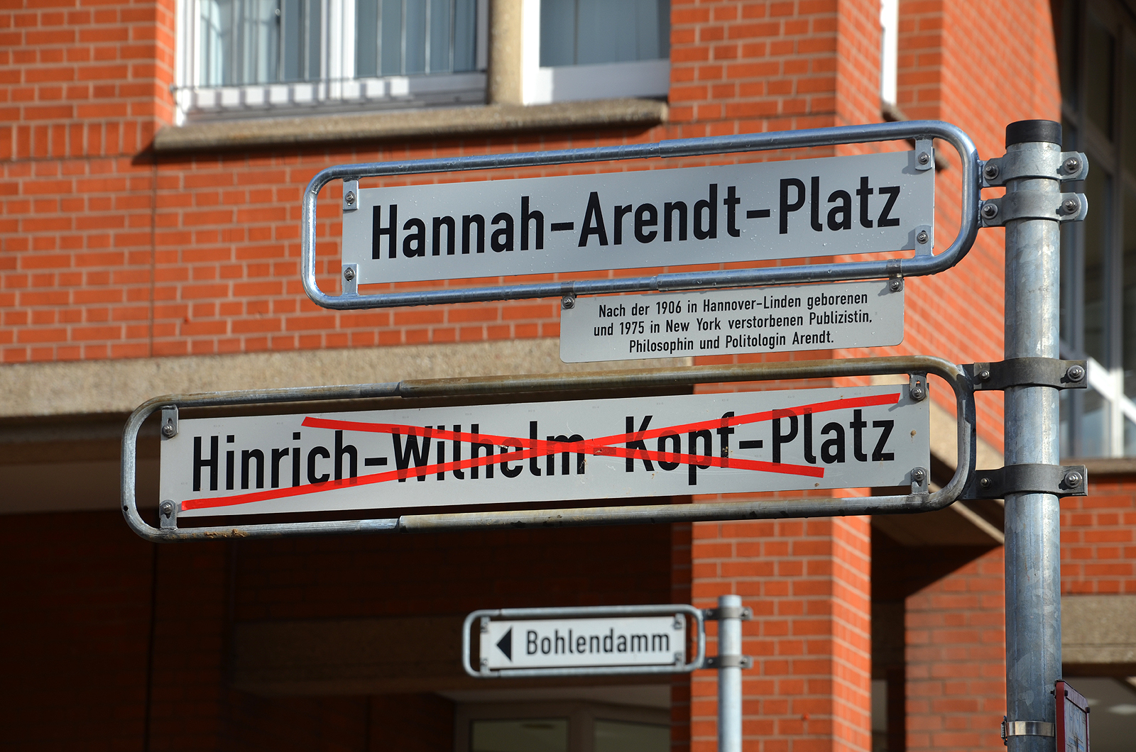 Nachdem der Stadtbezirksrat Hannover Mitte bereits im September 2014 nach eingehender Beratung die Umbenennung des Hinrich-Wilhelm-Kopf-Platzes in Hannover in Hannah-Arendt-Platz beschlossen hatte, wurde am 2. April 2015 in einer öffentlichen Feierstunde durch Hannovers Oberbürgermeister Stefan Schostok, Bezirksbürgermeister Michael Sandow, Niedersachsens Sozialministerin Cornelia Rundt und Landtagspräsident Bernd Busemann der Platz vor dem Niedersächsischen Landtag feierlich enthüllt ...